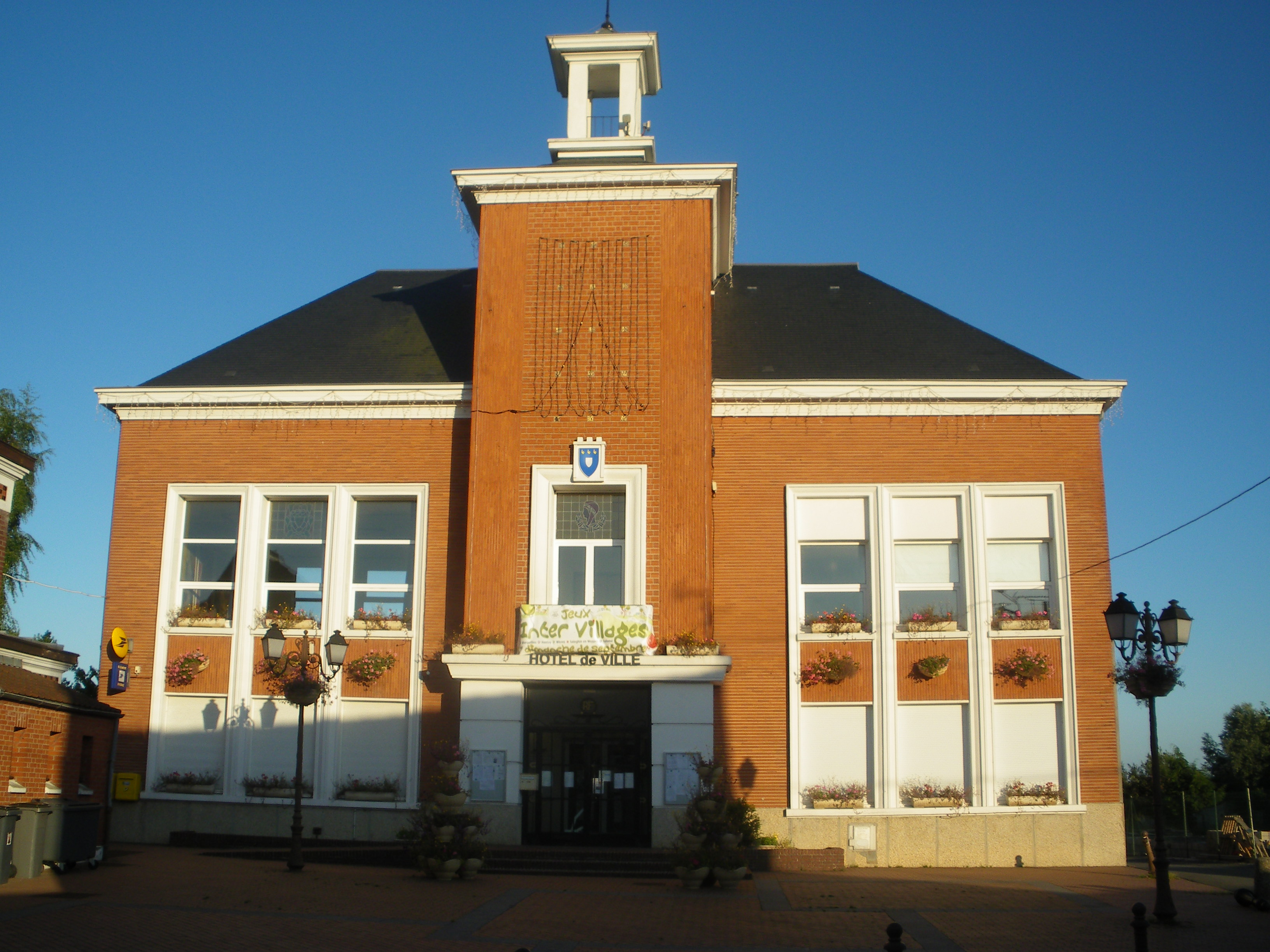 Vue de la mairie de Salomé dans le département du Nord.